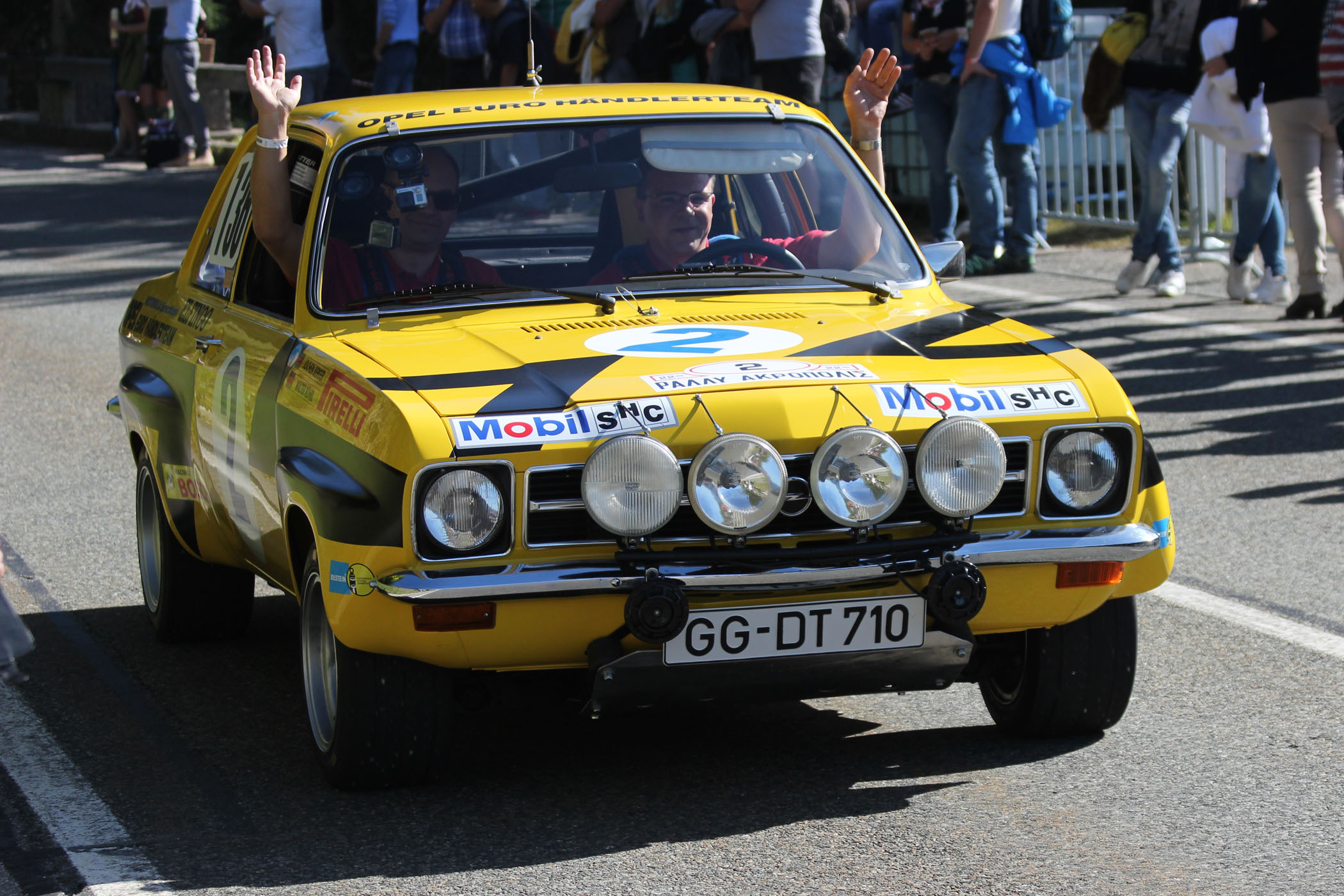 Röhrls Opel Ascona A - Rallye-EM und -WM 1973-1974